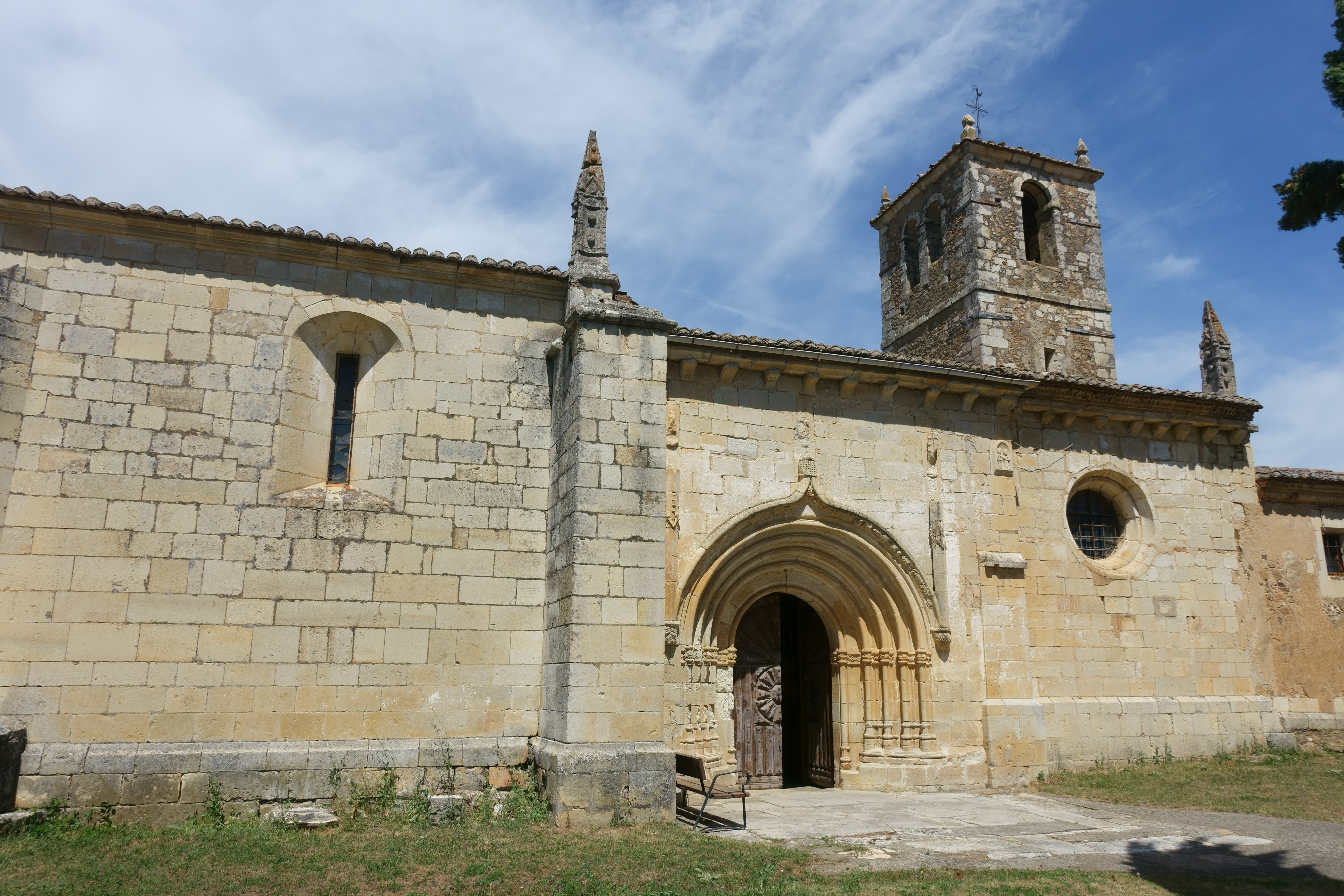 Iglesia de Santa María de Palacios, Congosto de Valdavia (Palencia, España).